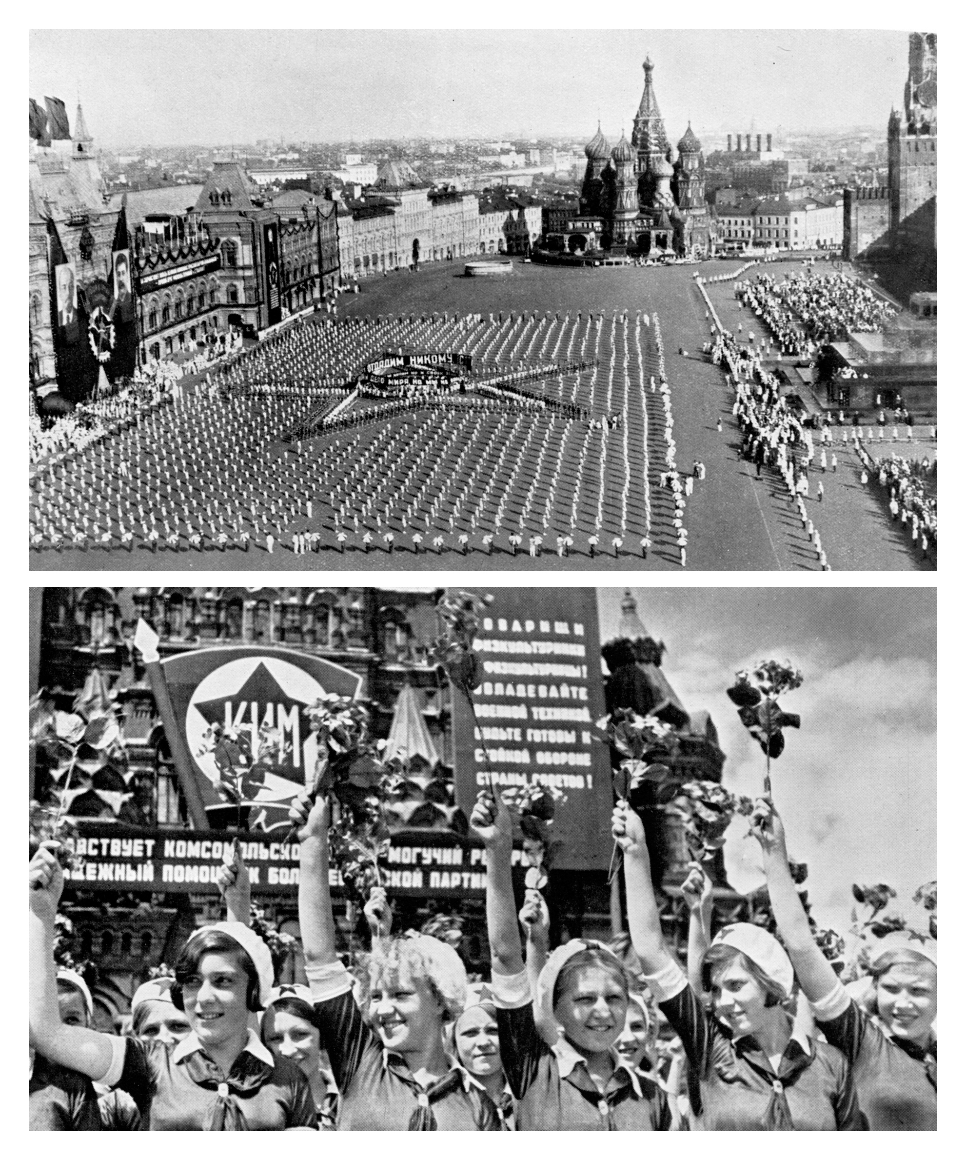 Leibesübungen auf dem Roten Platz